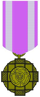 Padma Shri is an Indian civil medal of merit